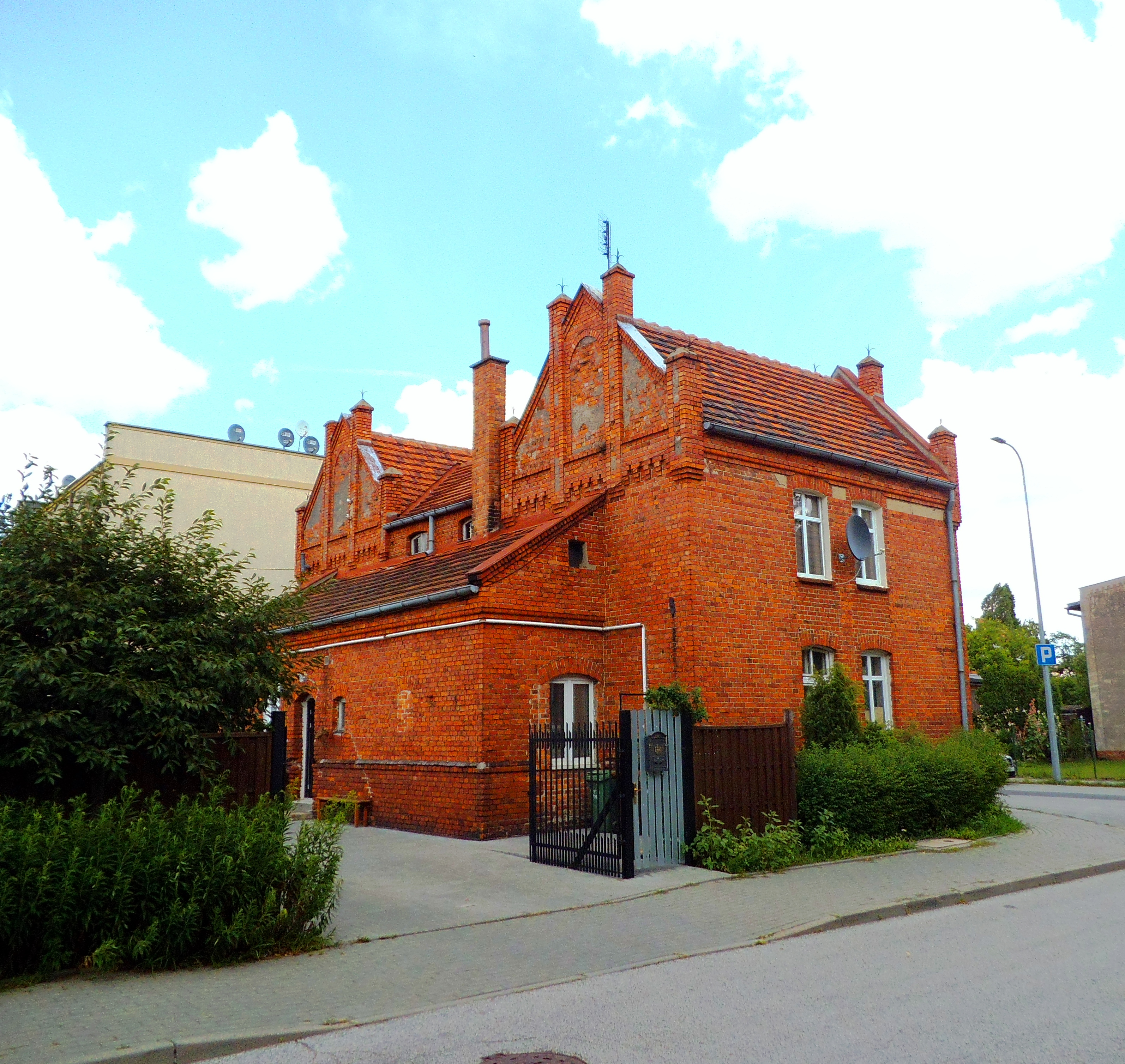 Budynek przy ul. Wyrzyskiej 30 w Toruniu1